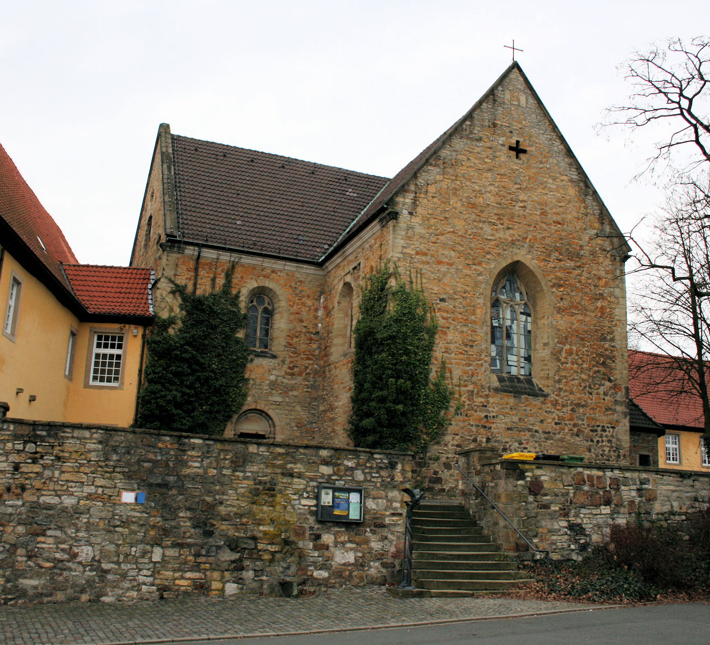 Getrudenkirche des Klosters Gertrudenberg in Osnabrück